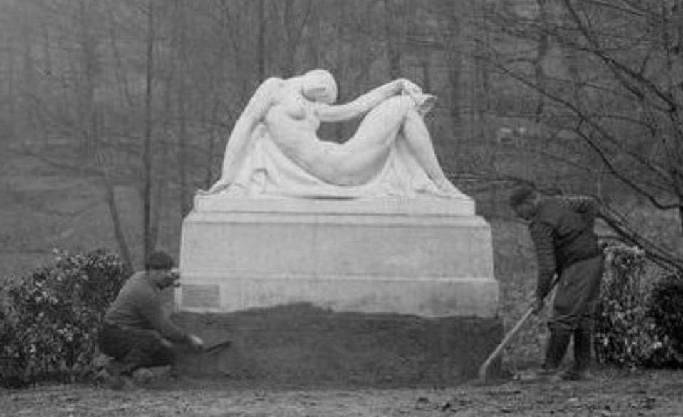 Gefertigt von François Popineau, Titel: La Bacchante à Bagnères, in Bagnères-de-Bigorre, Frankreich.